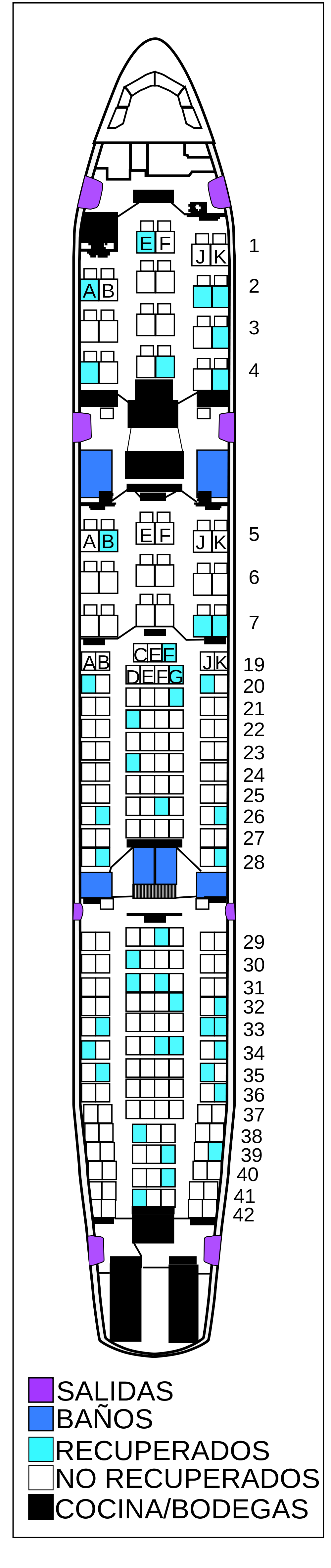 Diagrama de los asientos del vuelo 447 de Air France indicando los cuerpos recuperados en la búsqueda de 2009. (Español)